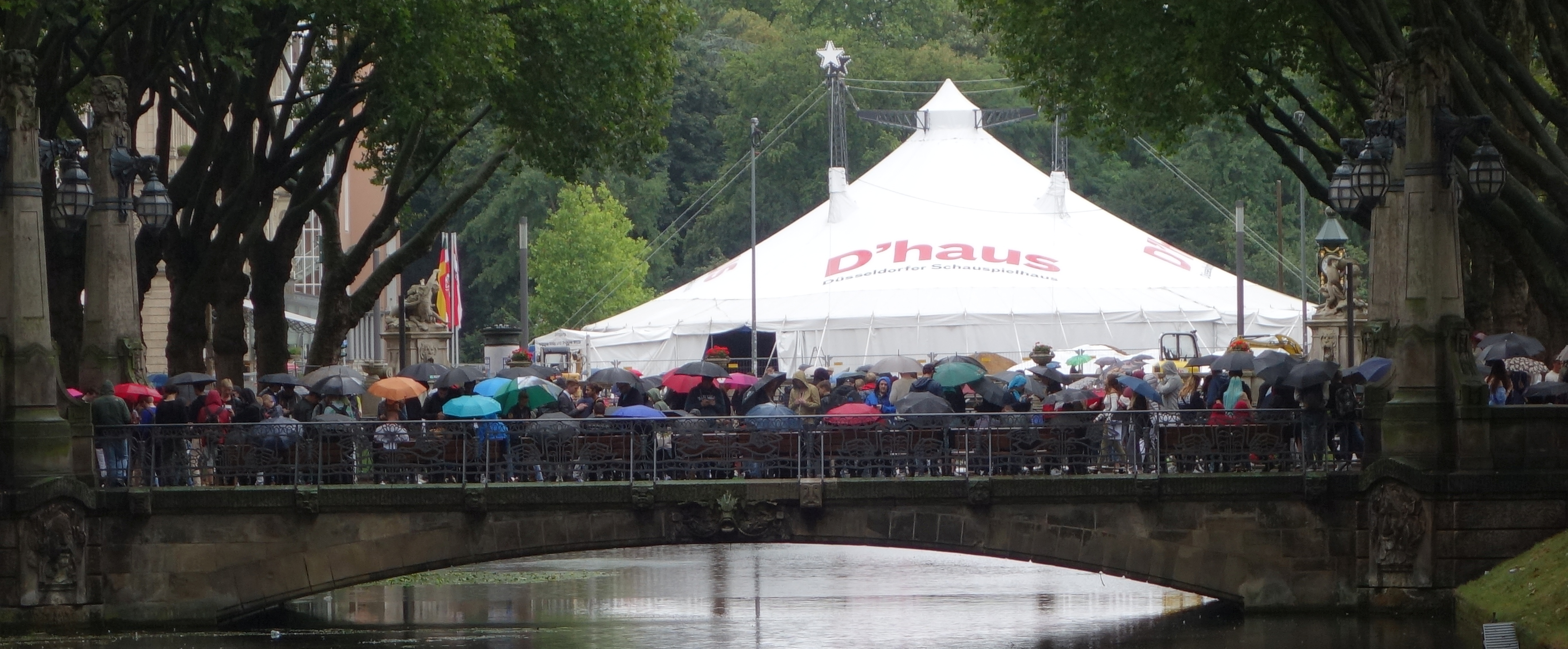 Düsseldorf, Königsallee, Girardet-Brücke, Pokémon-Jäger an einem Regentag, August 2016 (Blickrichtung Norden, zum Hofgarten). Im Hintergrund das Zelt des Schauspielhauses, Interims-Spielstätte während des Umbaues.